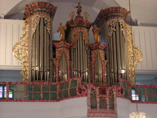 Orgulje u varaždinskoj katedrali